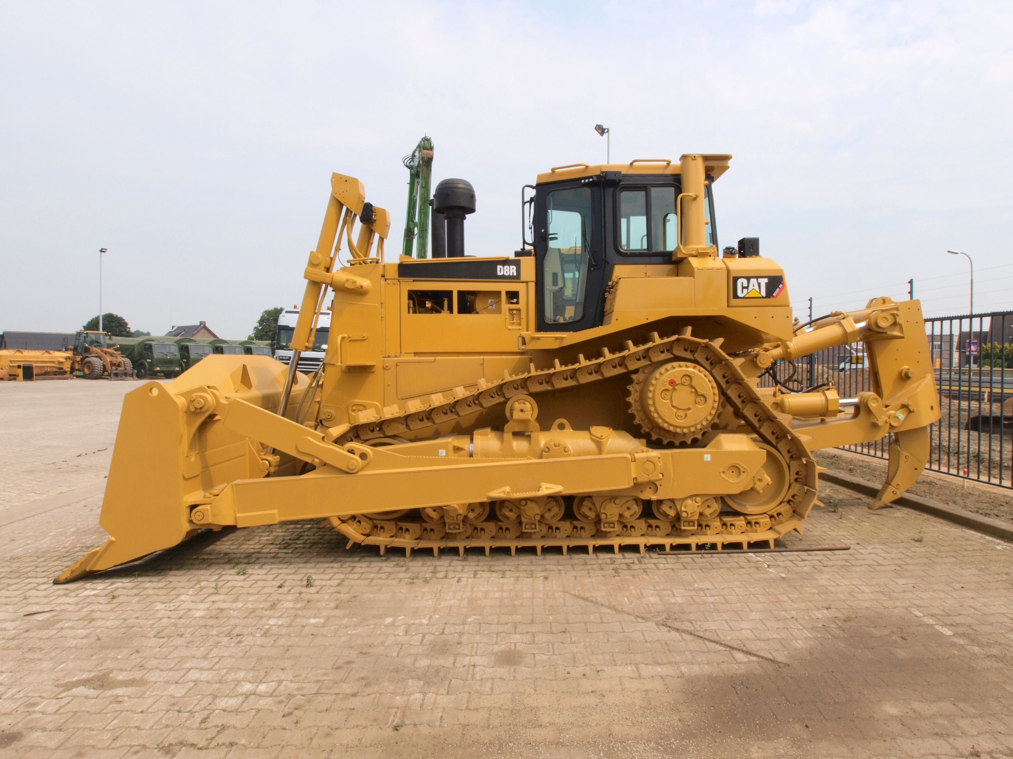 Caterpillar D8R